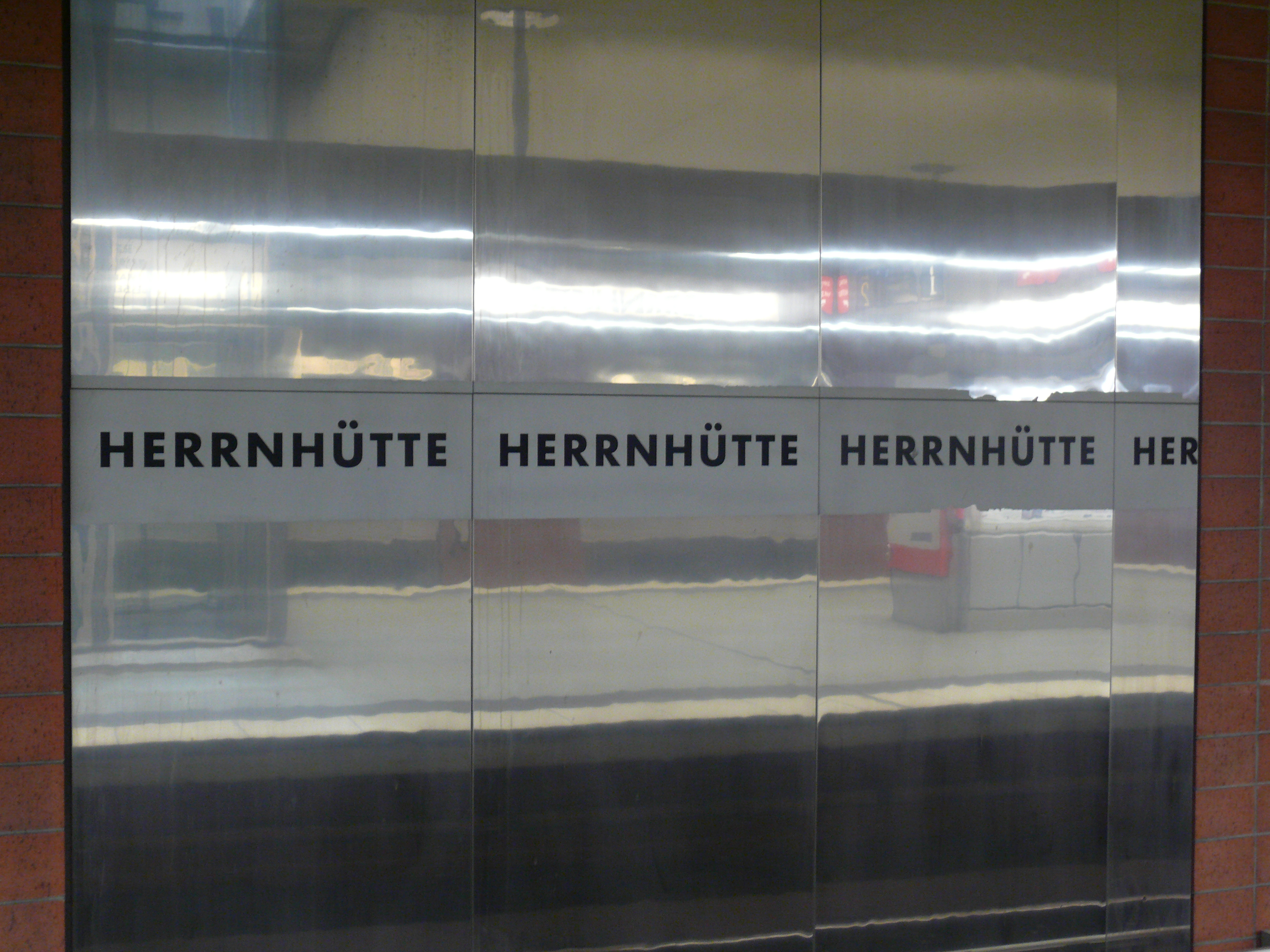 Stationsname an den (teilweise verspiegelten) Bahnsteigwänden am U-Bahnhof Herrnhütte in Nürnberg.